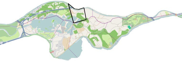 Géolocalisation Grand Parc de Miribel-Jonage. Territoire de Saint-Maurice-de-Beynost.